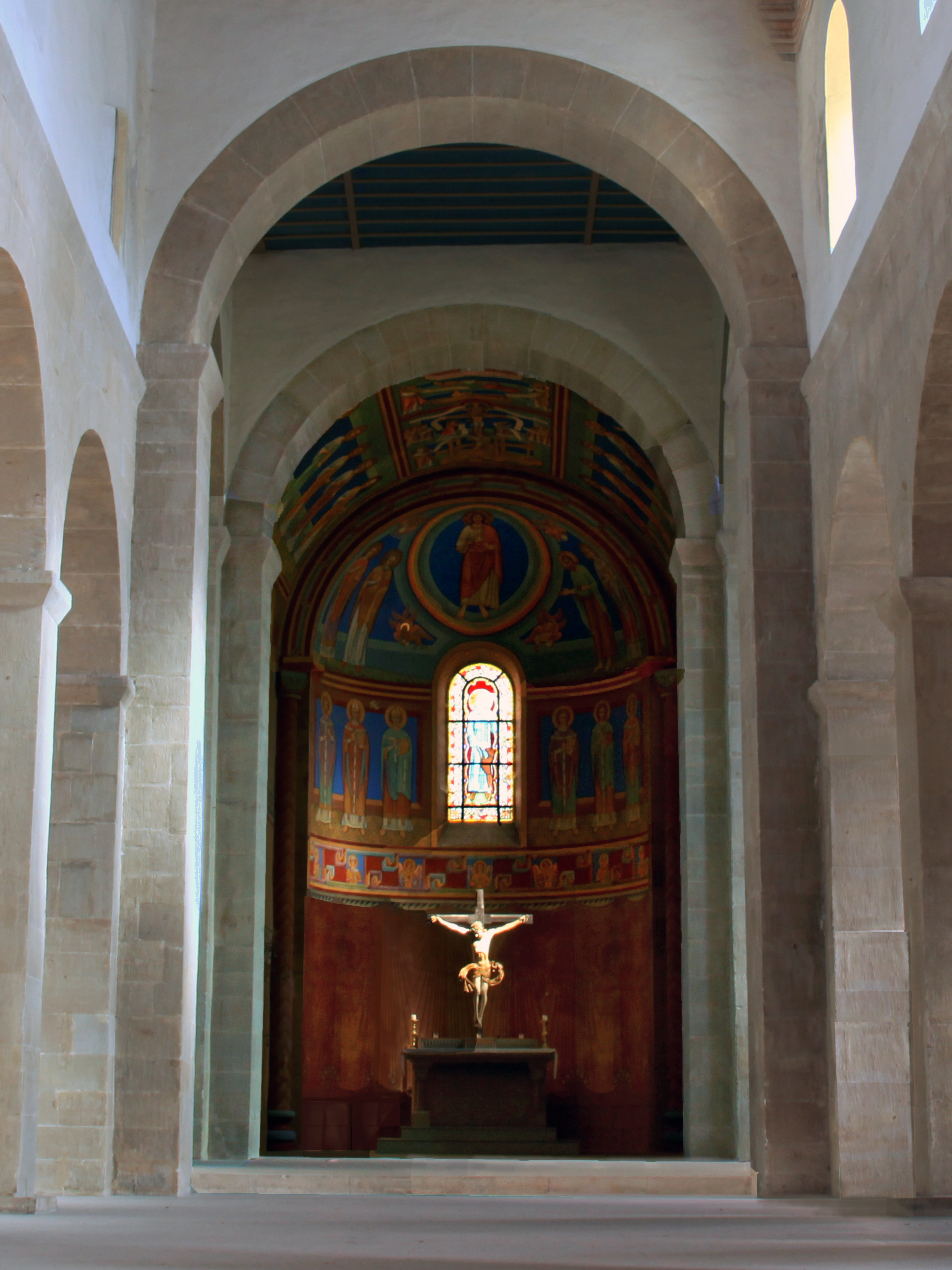 Церковь Святого Эгидия